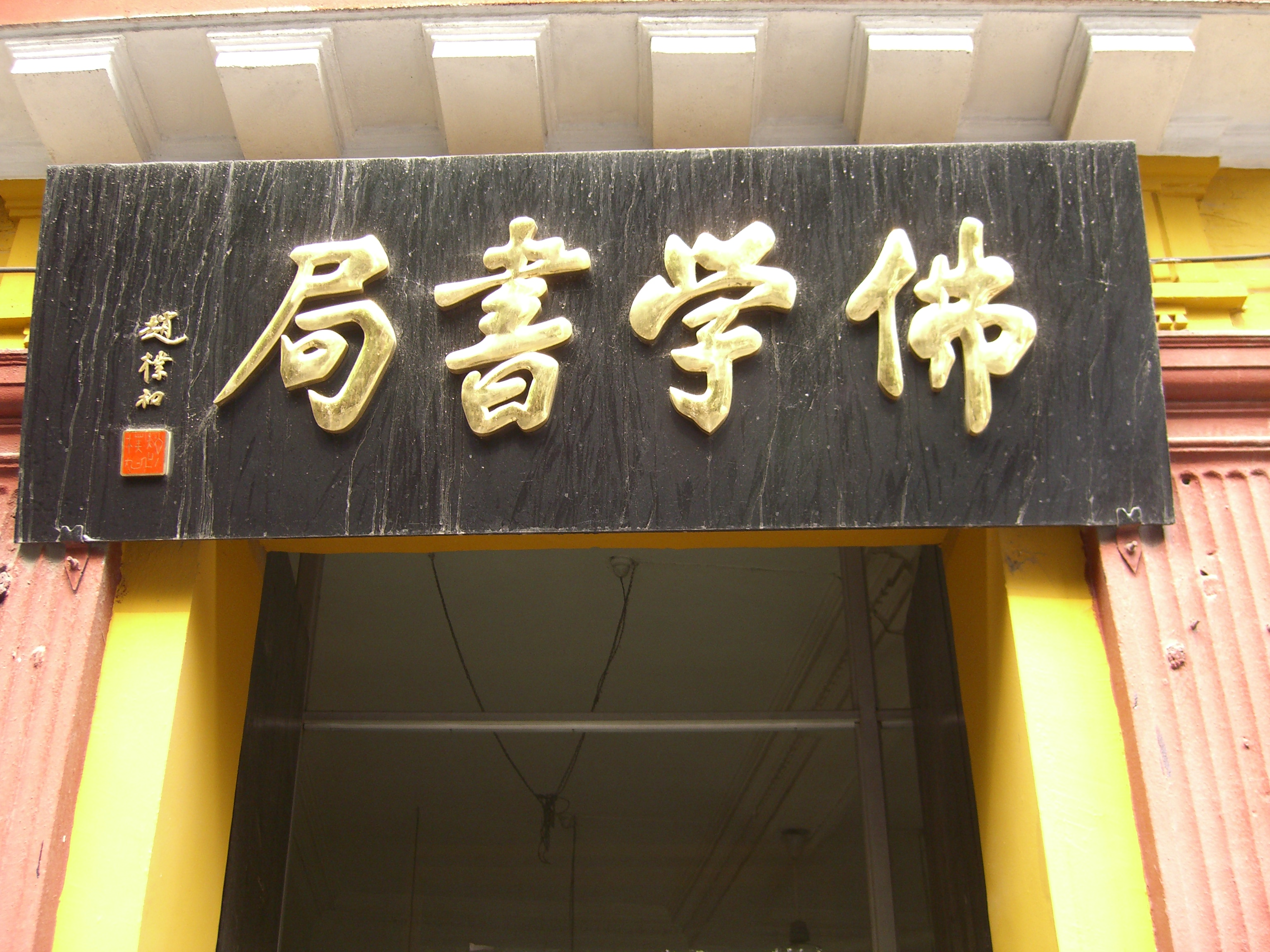 中文（中国大陆）: 赵朴初题字的上海佛学书局匾额。